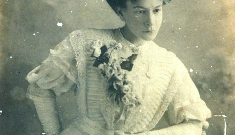 Retrato de Luisa Luisi.